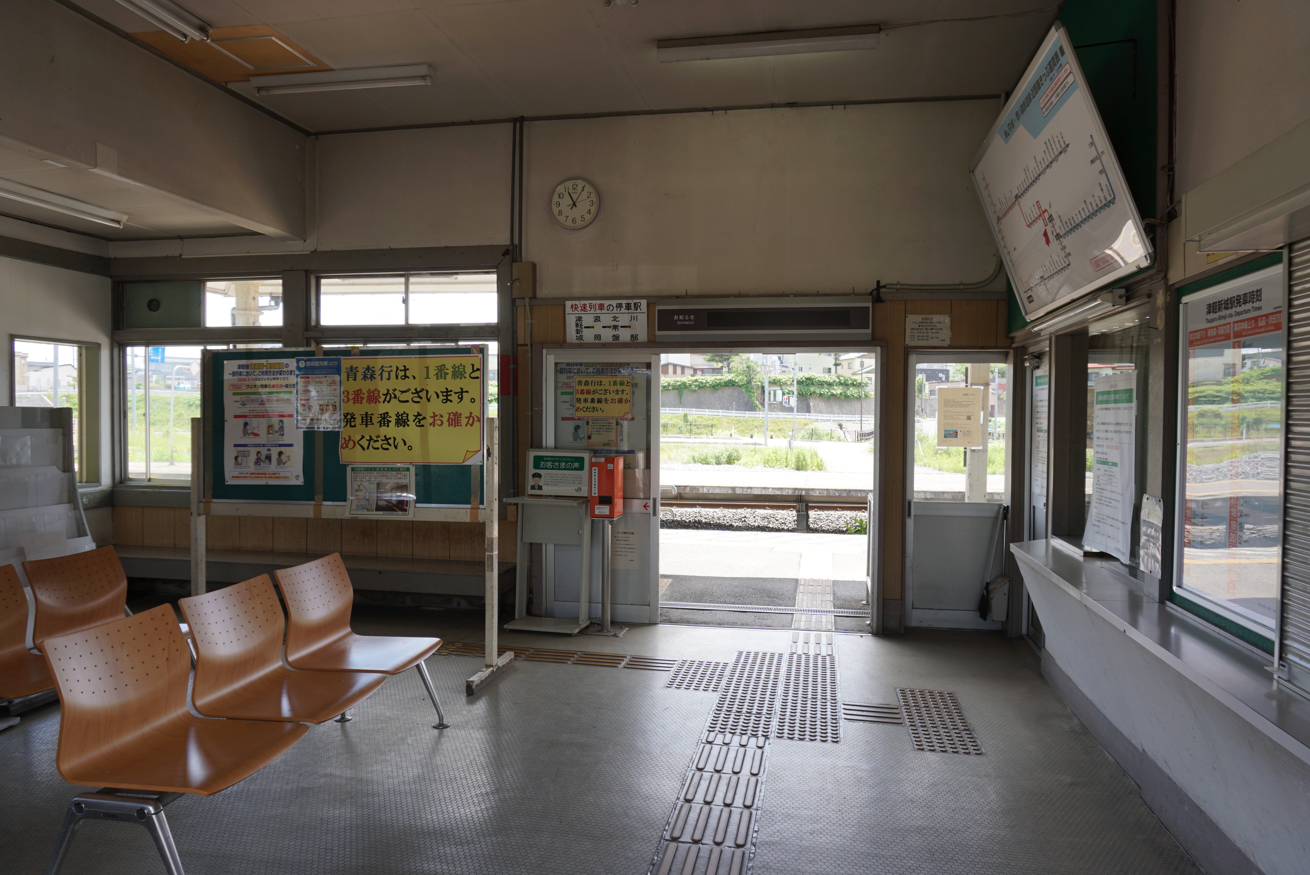 奥羽本線 津軽新城駅（青森県青森市）